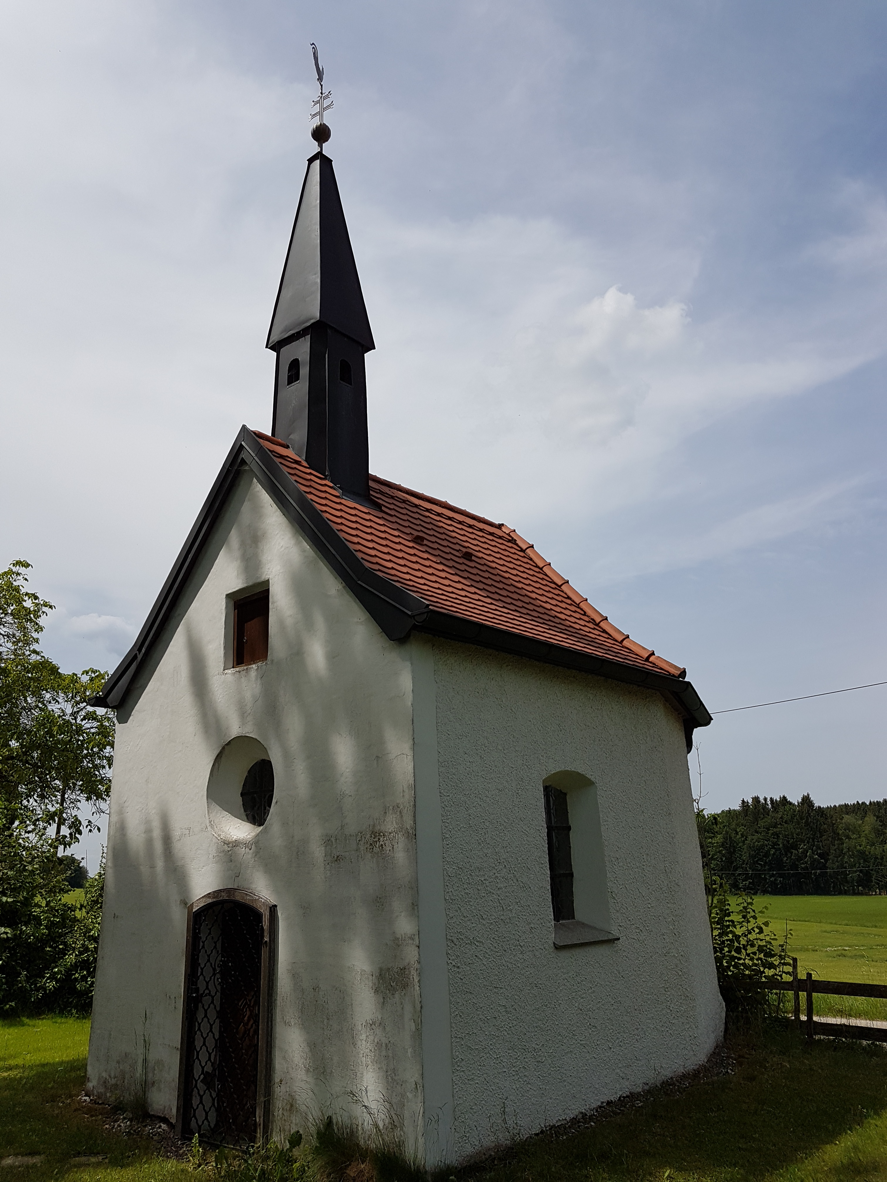 Punding (Dietramszell), Weilerkapelle von 1801.